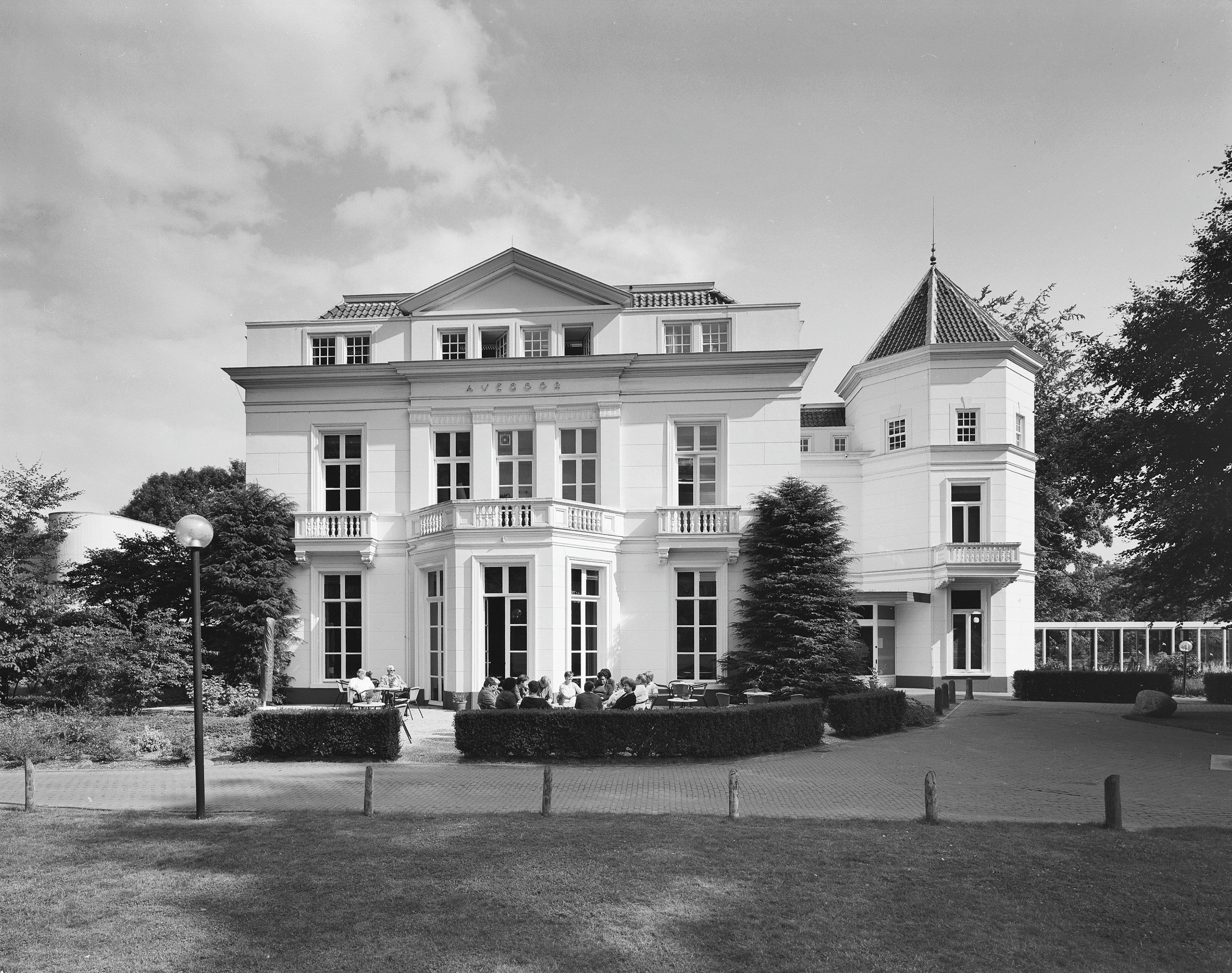 Huis Avegoor: Overzicht voorgevel (opmerking: Gefotografeerd voor Monumenten In Nederland Gelderland)